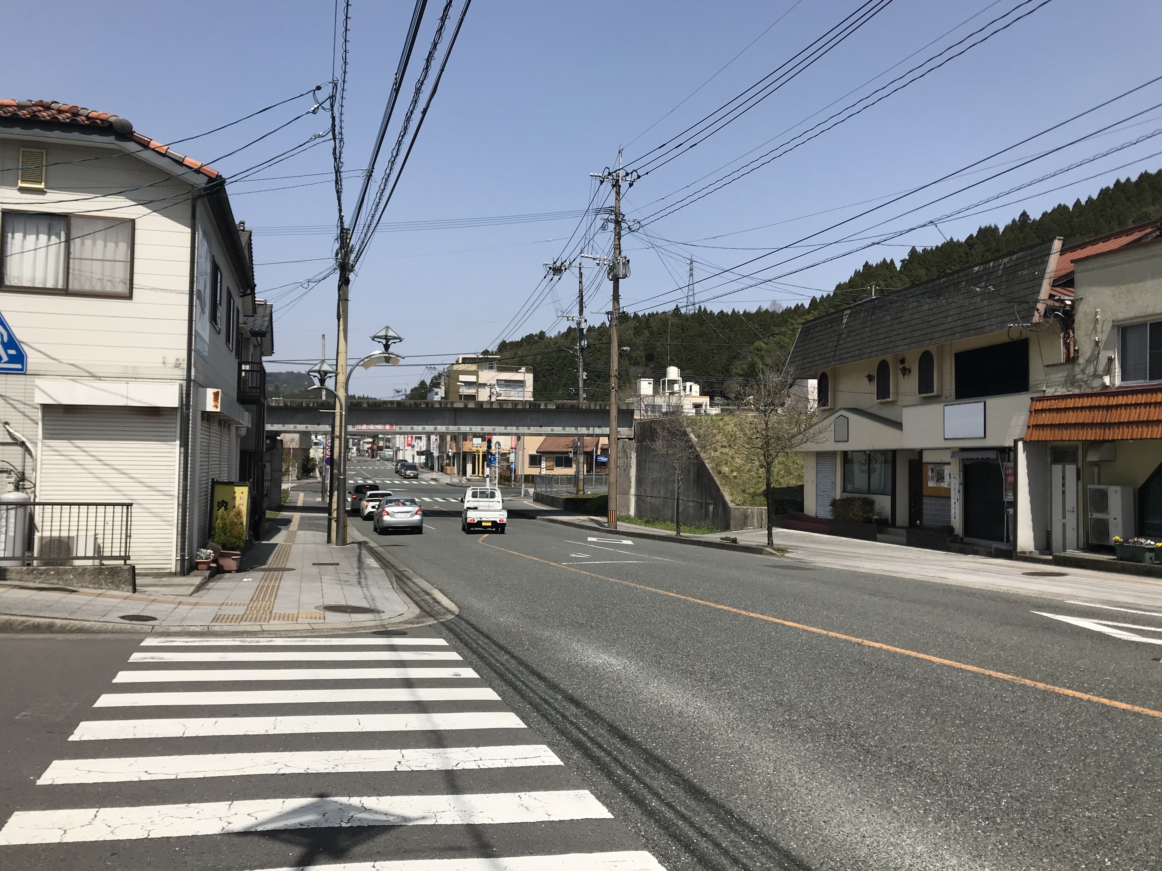 春日十字路交差点南側の大分県道43号